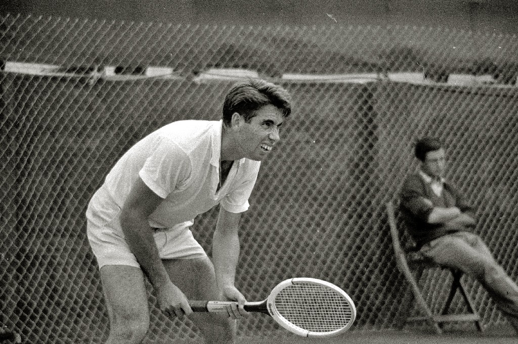 Título original: Manolo Santana durante un partido de Copa Davis en el Club de Tenis de San Sebastián (14/20) Localización: San Sebastián (Guipúzcoa)